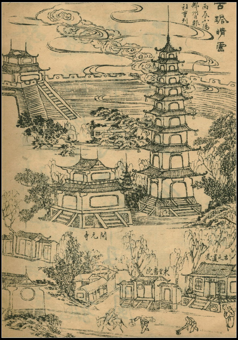 zhengzhou